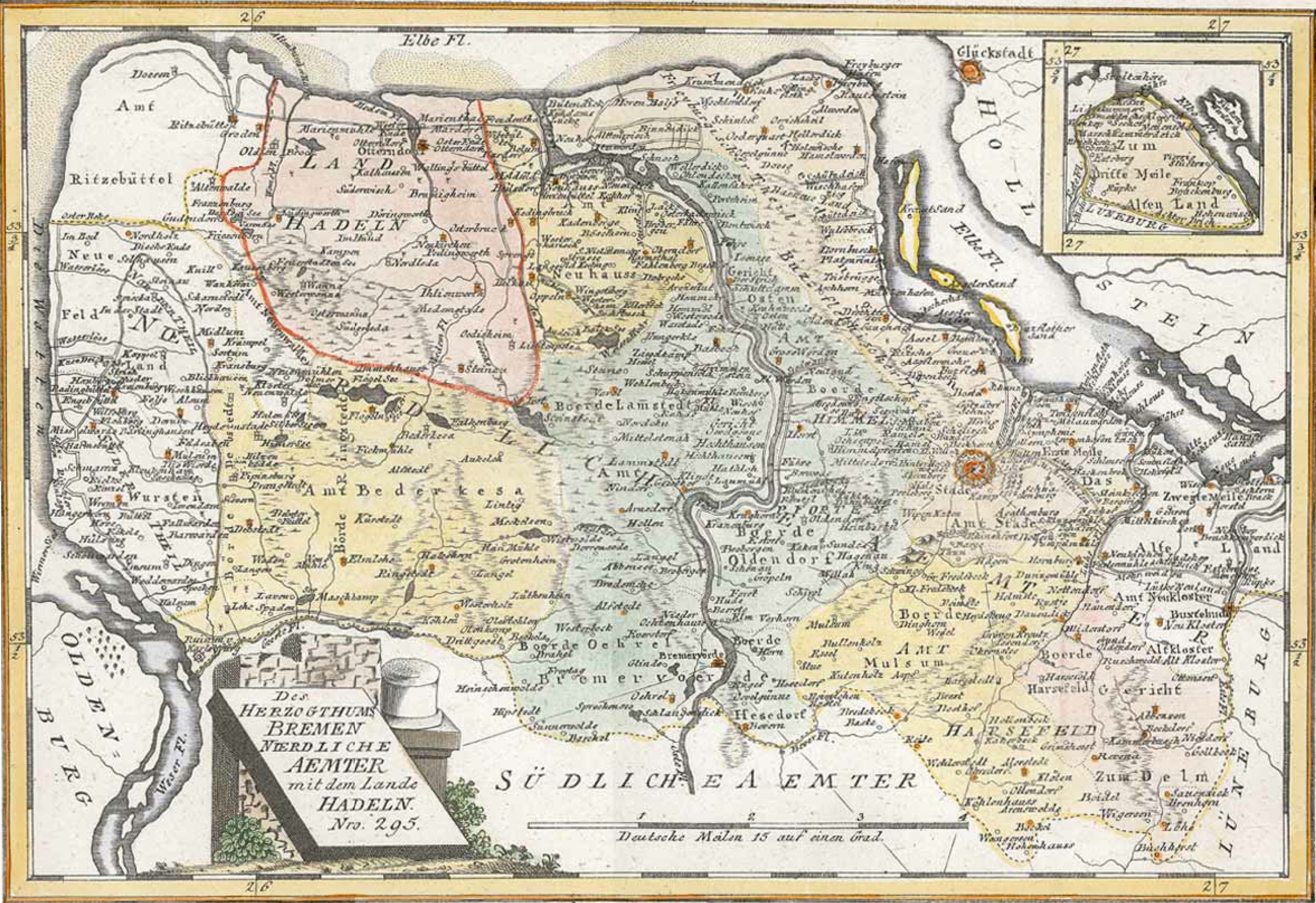 Des Herzogthums Bremen nœrdliche Aemter mit dem Lande Hadeln